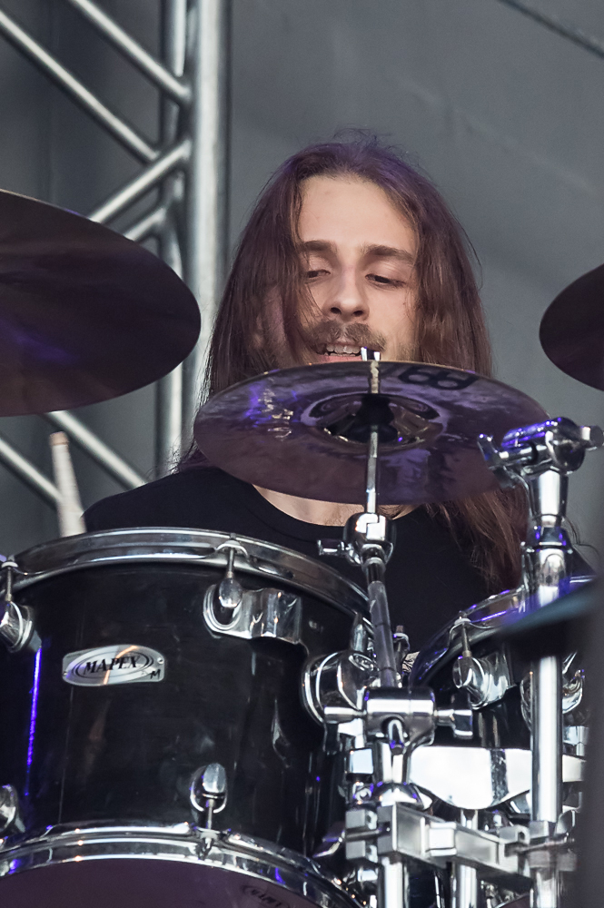 Vader - Rock Harz 2013 - 11-07-2013